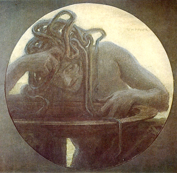 Medusa